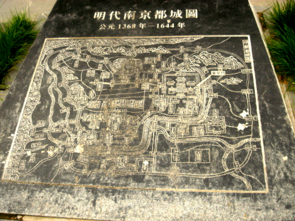 南京东华门旁的明代南京都城图